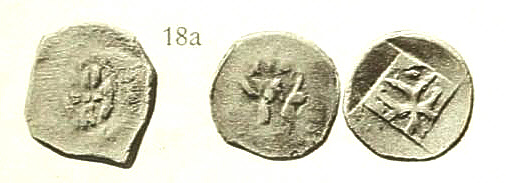 Händleinheller des Markgrafen Rudolf III. von Hachberg-Sausenberg. Zwei Münzen aus einem Fund bei Trier. Abgebildet sind beide Vorder- und eine Rückseite. Auf der Vorderseite eine Hand mit einem R; auf der Rückseite ein Ankerkreuz mit je einer Kugel in den Gabeln.